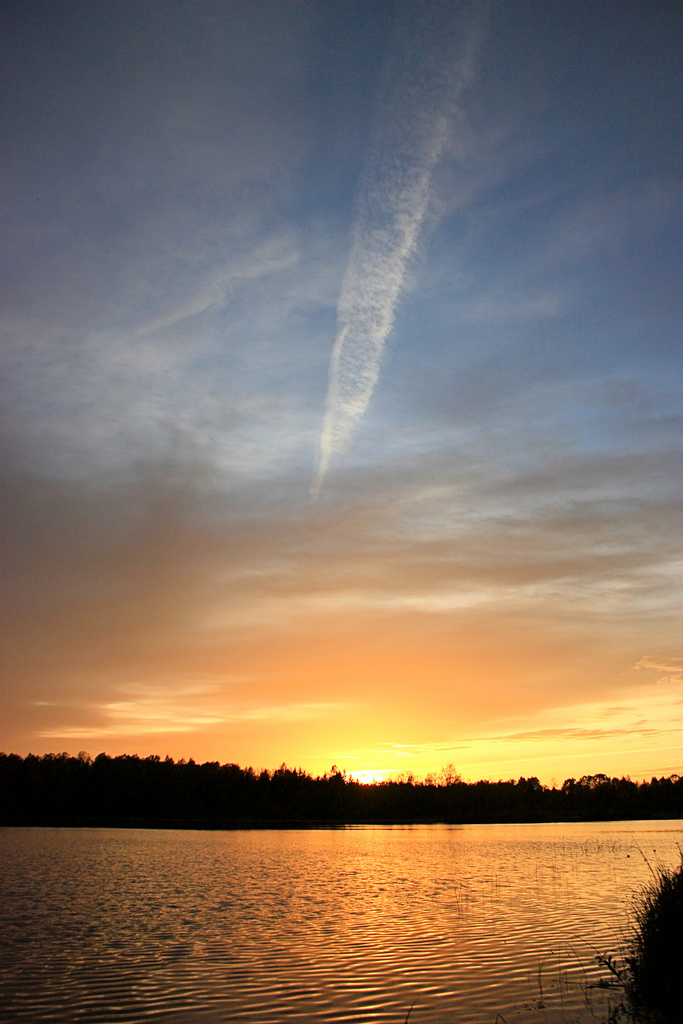 Eistvere lake, Estonia